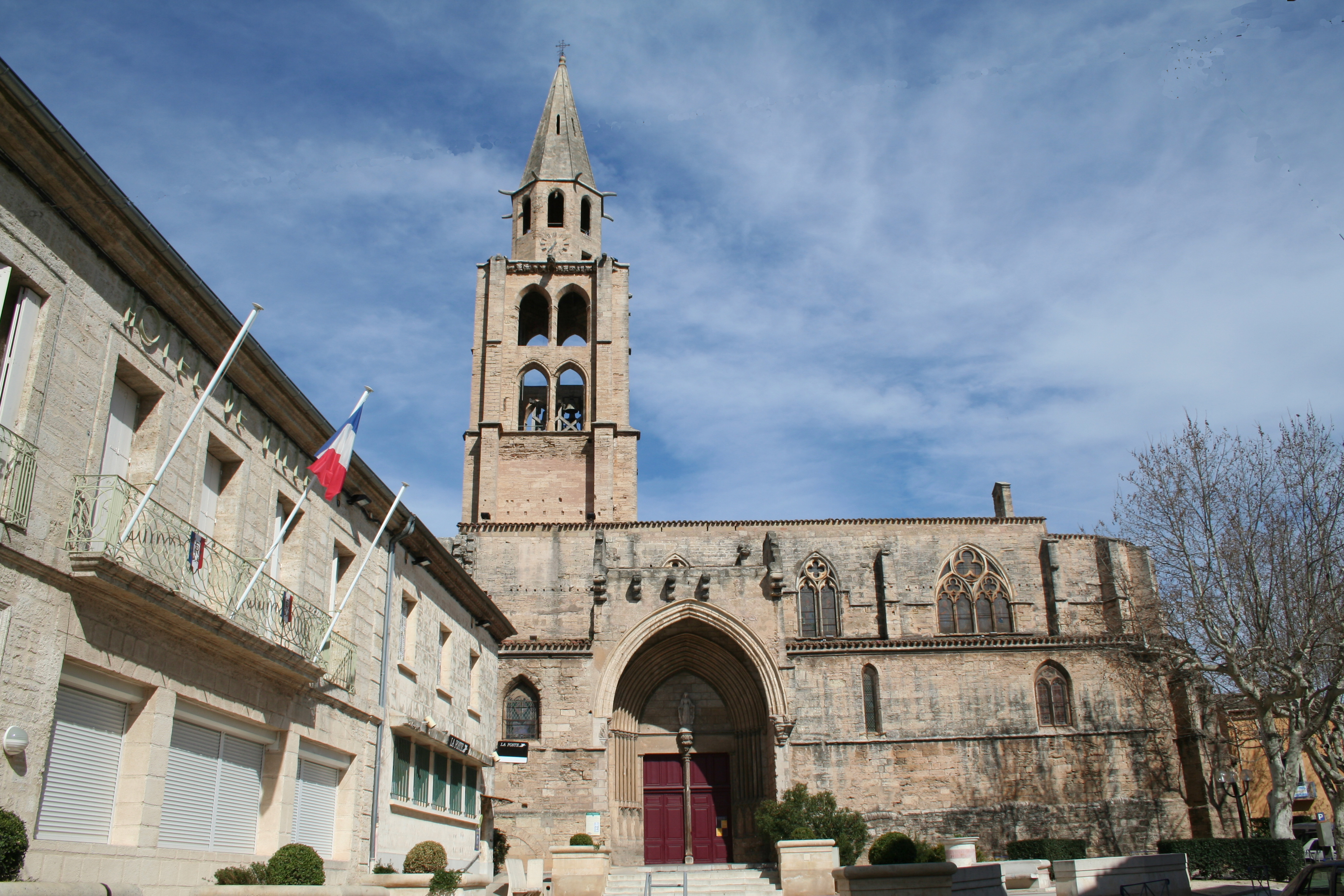 Montagnac (Hérault) - Église Saint-André.